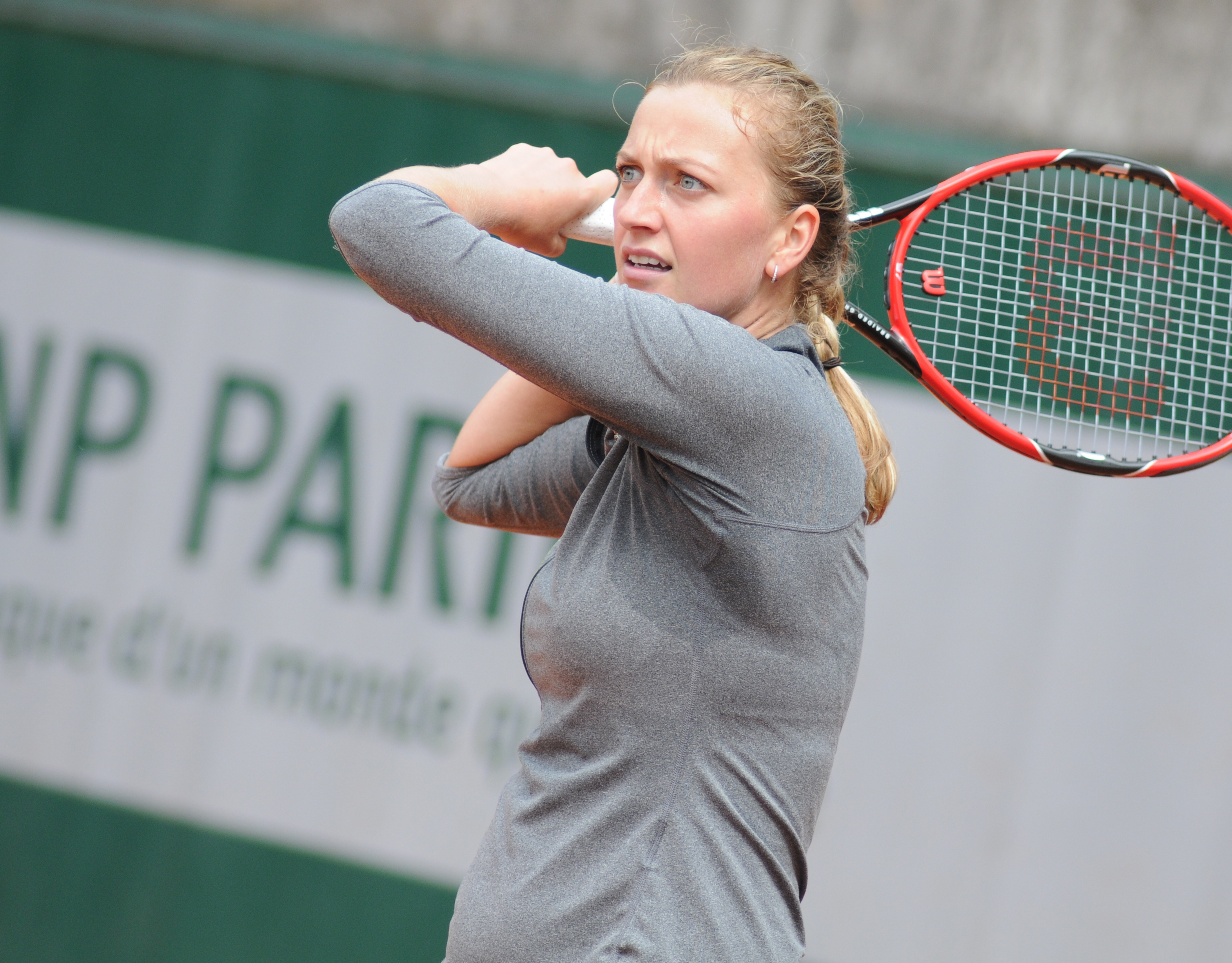 Petra Kvitova